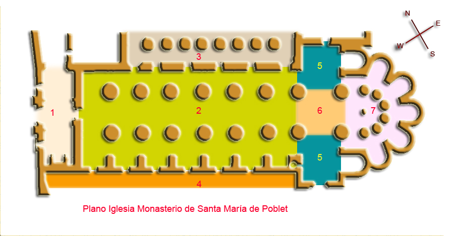 Plano de la Iglesia del monasterio de Santa María de Poblet